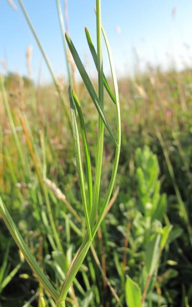 Oenanthe silaifolia à Saint-Quentin-en-Tourmont (80) ref photo : urn:lsid: :celpic:39757